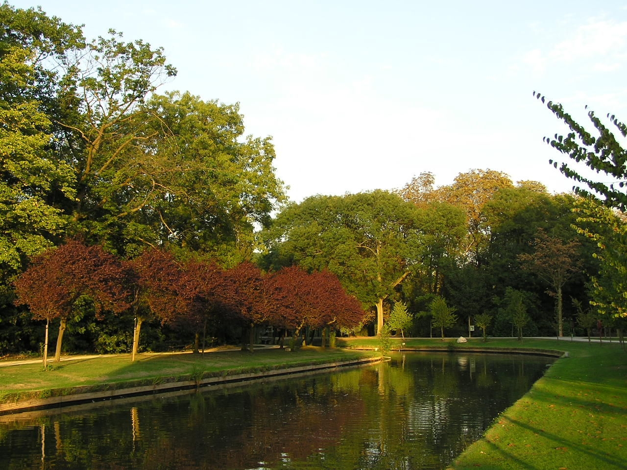 Pond at the Vrijbroekpark, Belgium.